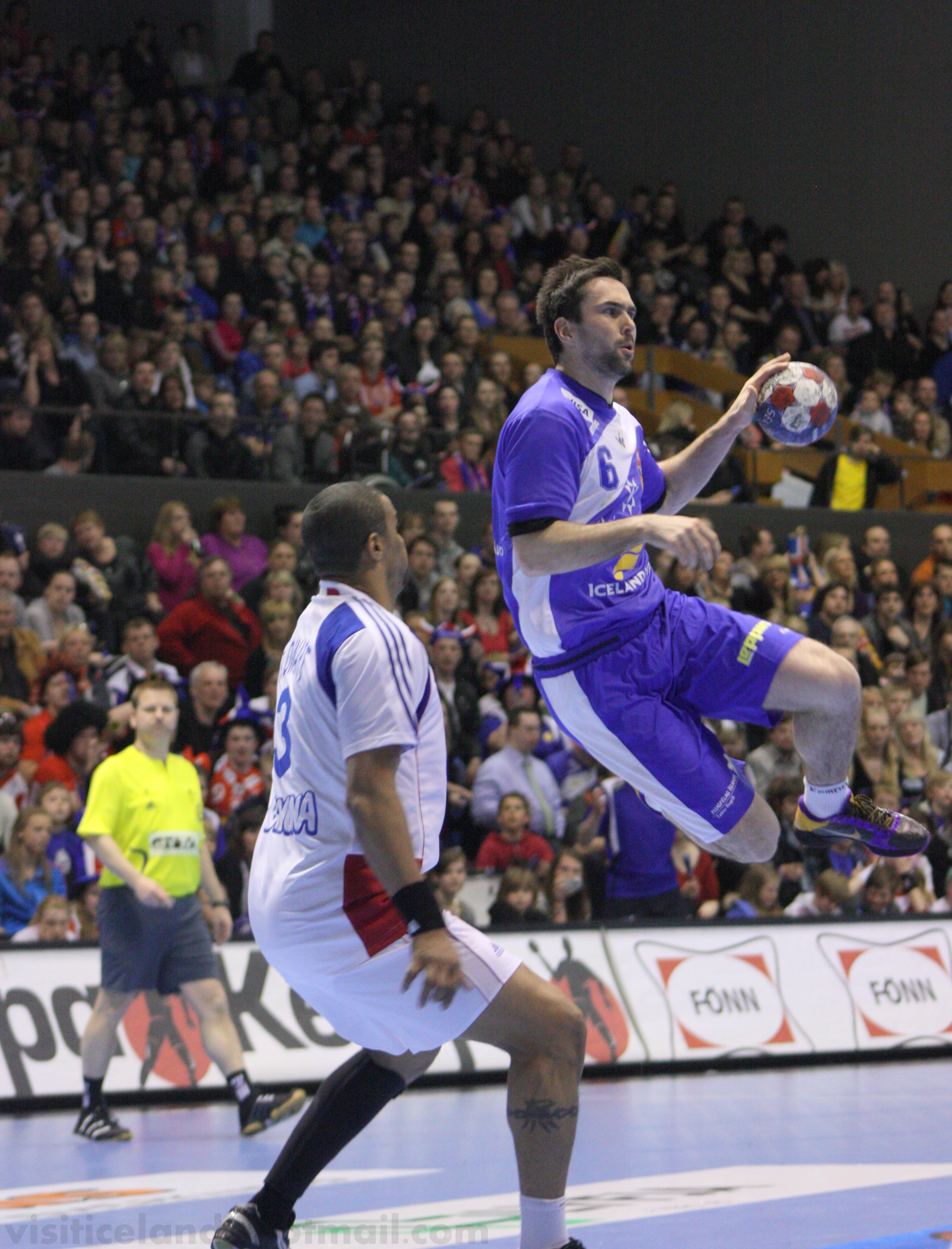 Ísland - Frakkland 16. & 17. apríll 2010